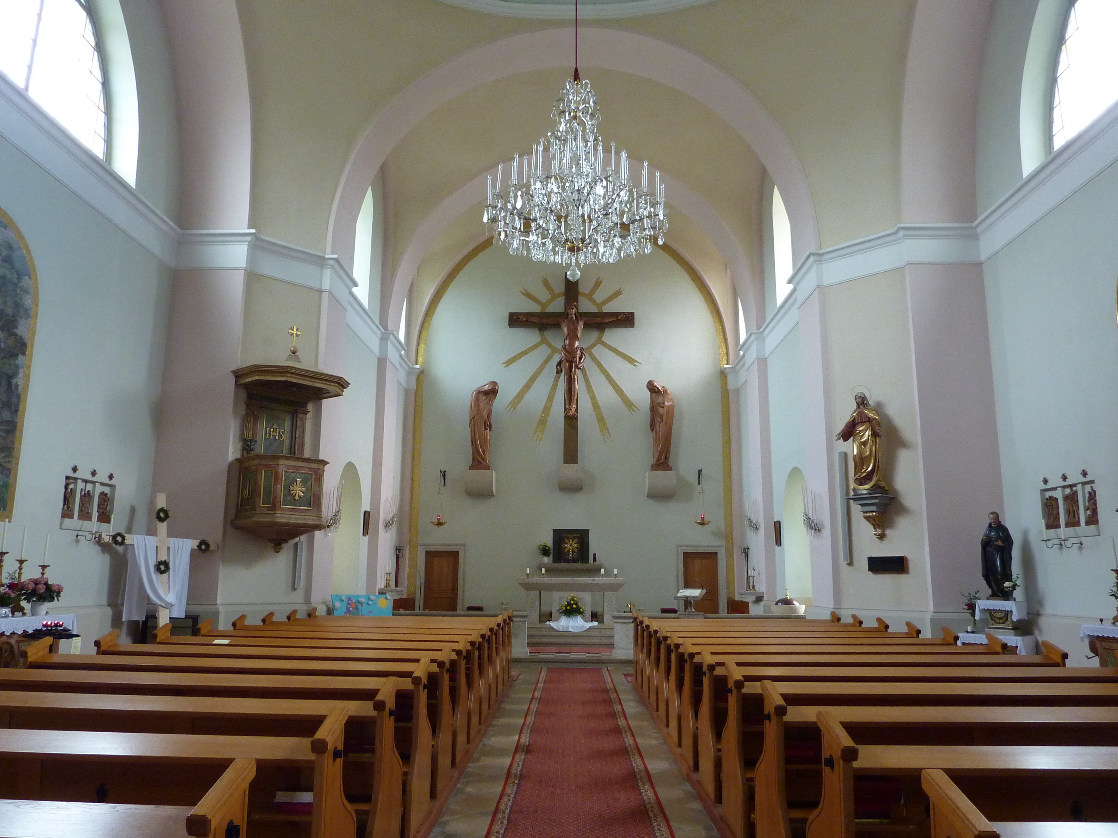 Pfarrkirche hl. Florian, Hanfthal, Laa an der Thaya, Niederösterreich